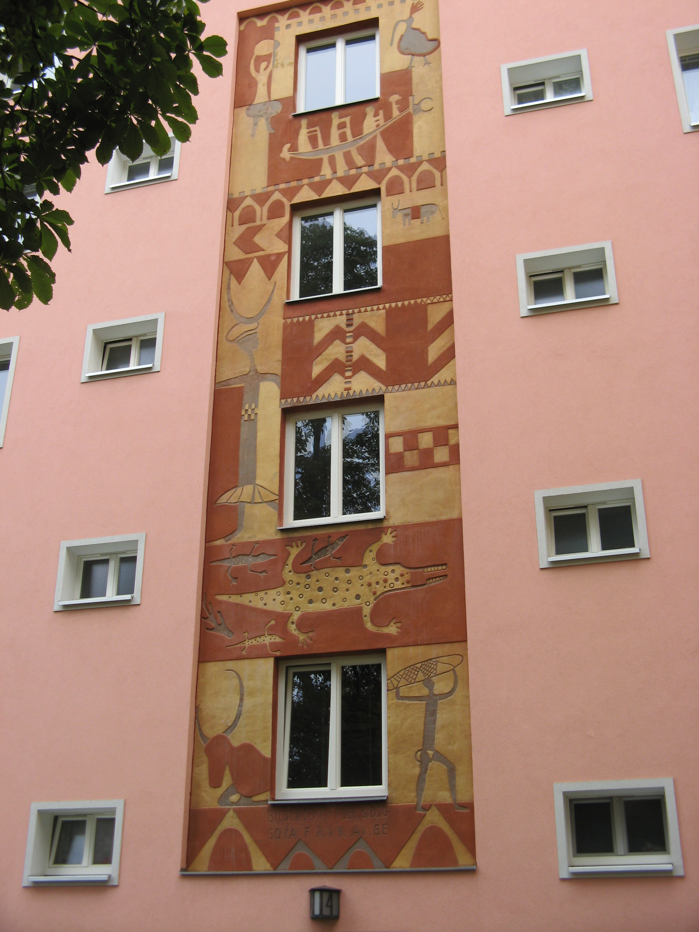 Sgraffito Afrikanische Schriftzeichen (1960) von Godwin Ekhart, Wienerbergstraße 14, Wien-Meidling